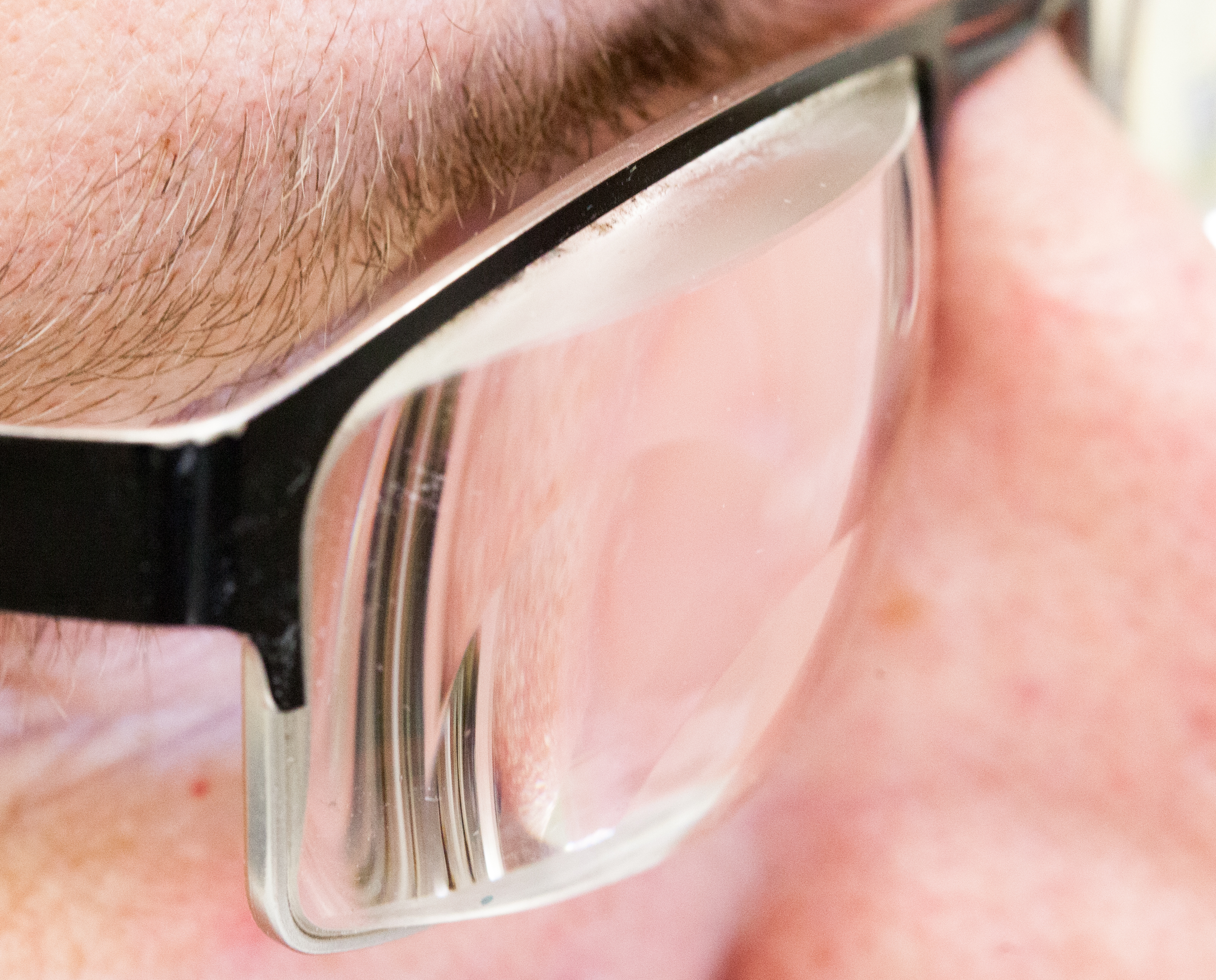 Starbrille (heutzutage nur noch selten); wegen einer Augenerkrankung (mehrfache AugenOP's seit frühester Kindheit und Vernarbung) können keine Linsen implantiert werden